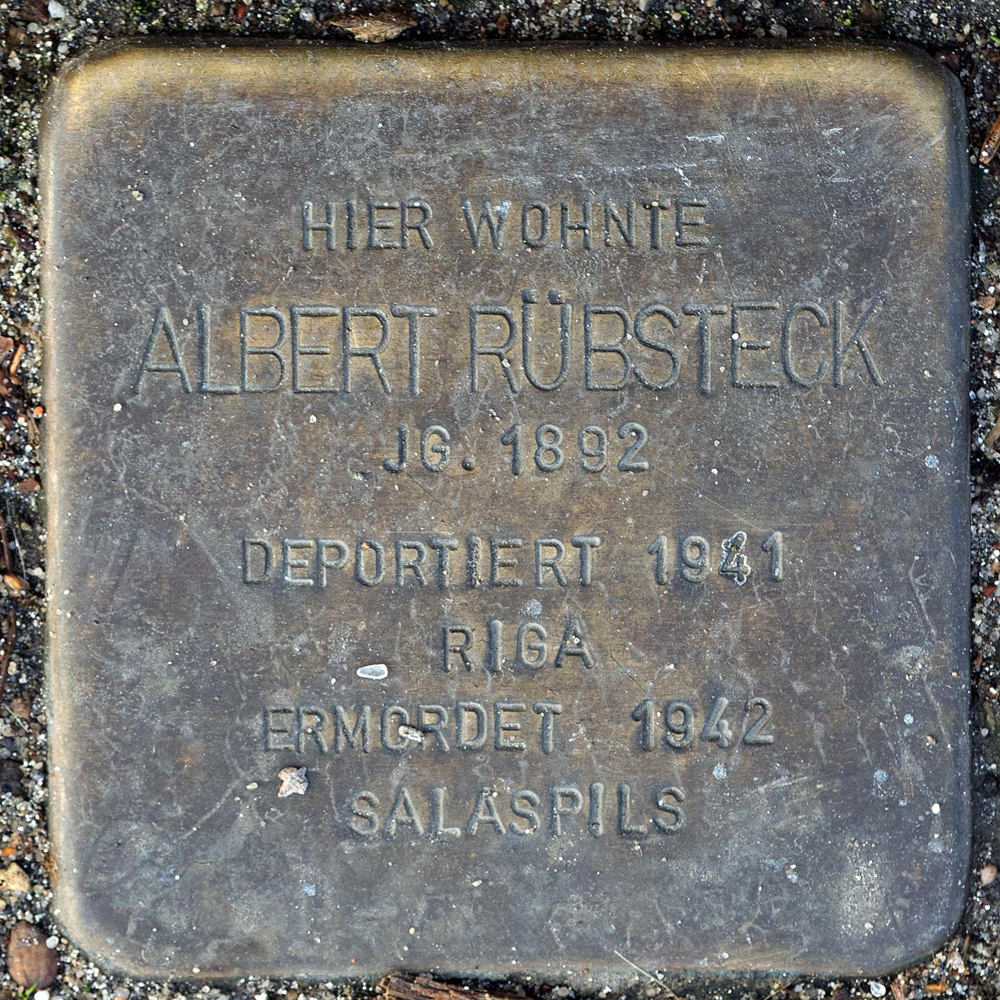 Stolperstein für Ruebsteck Albert